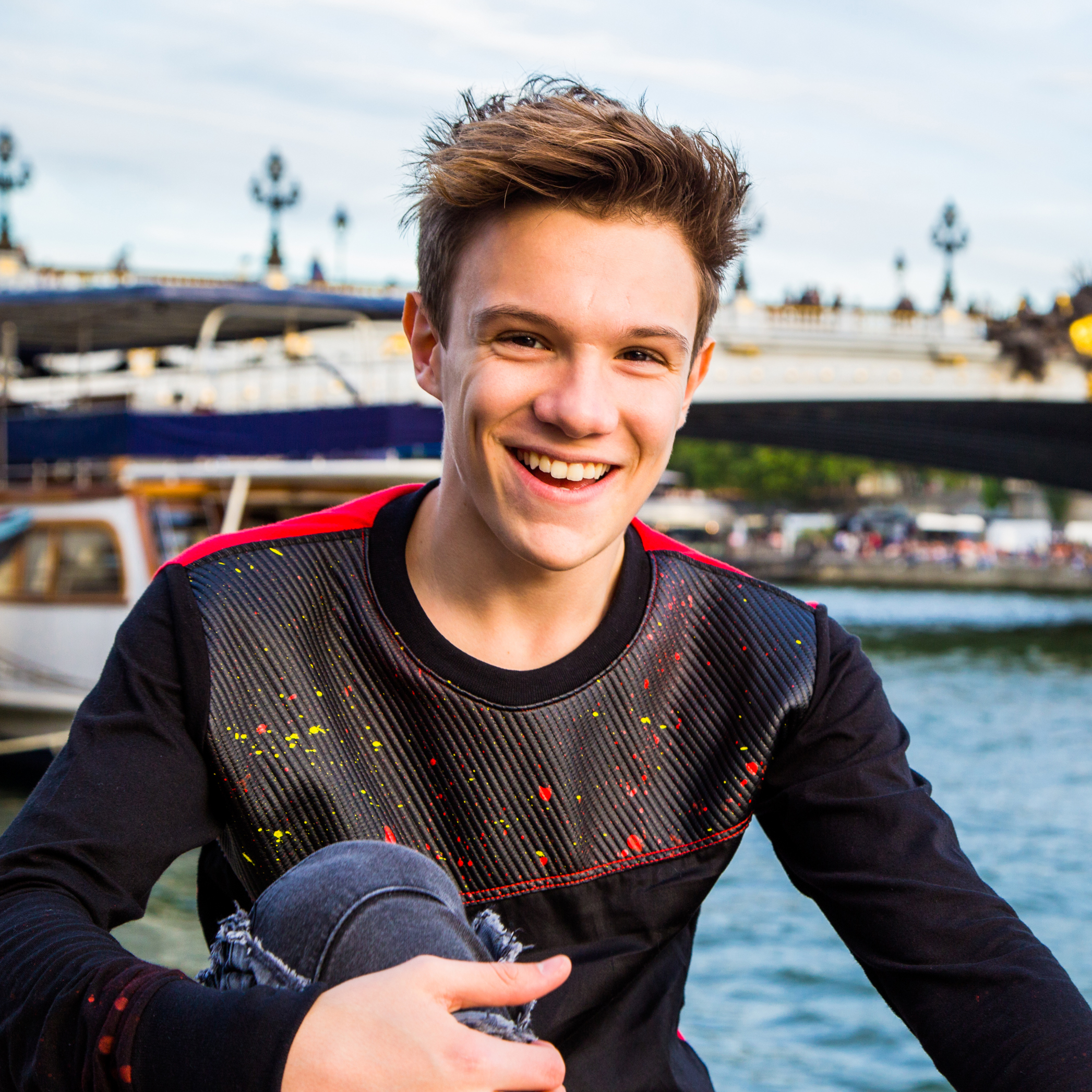 Lenni-Kim à Paris